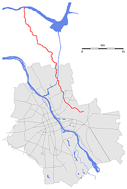 Kanał Bródnowski i Kanał Bródnowski Dolny (czerwona linia) na tle konturu Warszawy. Mapka wykonana przy pomocy programu GMT 5.1.1